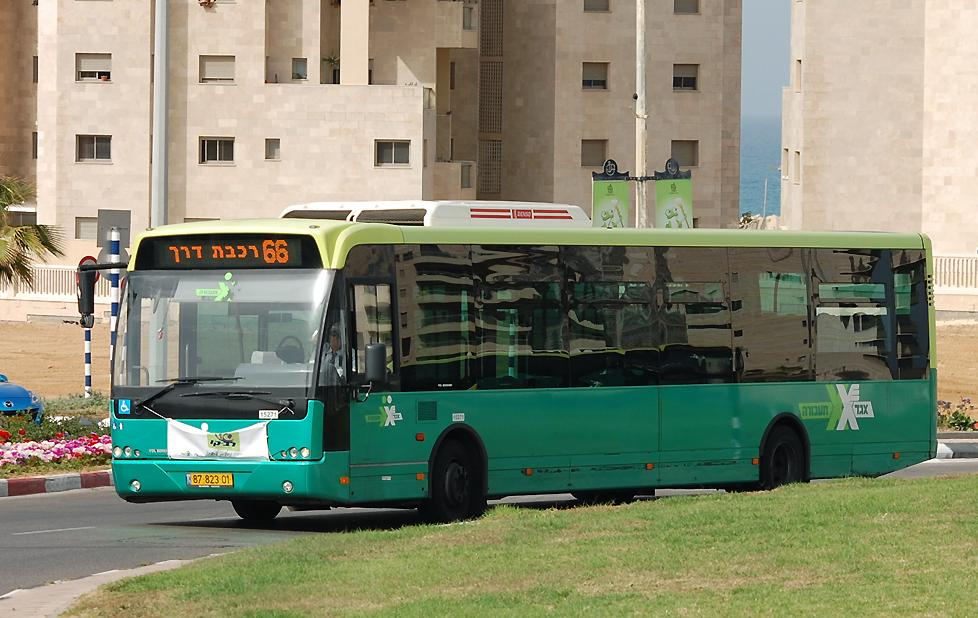 אוטובוס עירוני מדגם DAF BERKHOF